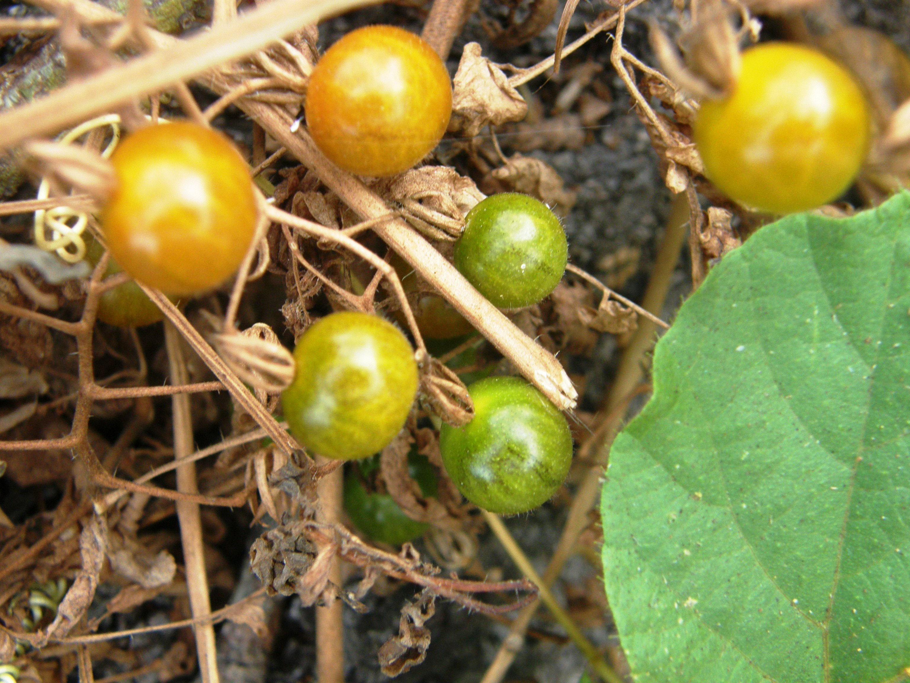 Frutos de tomates de Galápagos